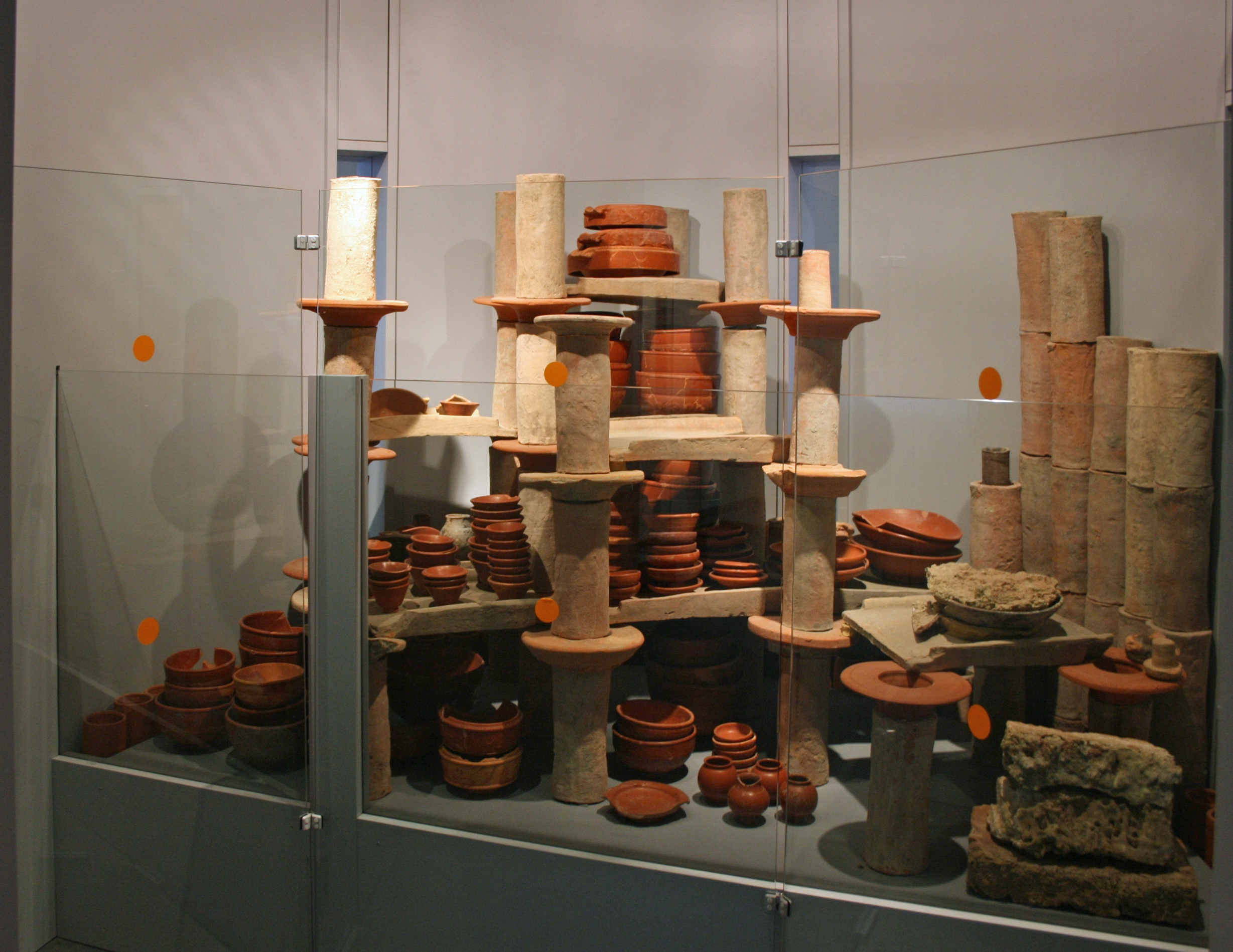 Rekonstruierte Ofenbefüllung eines Terra-Sigillata-Ofens im Museum in Rheinzabern.